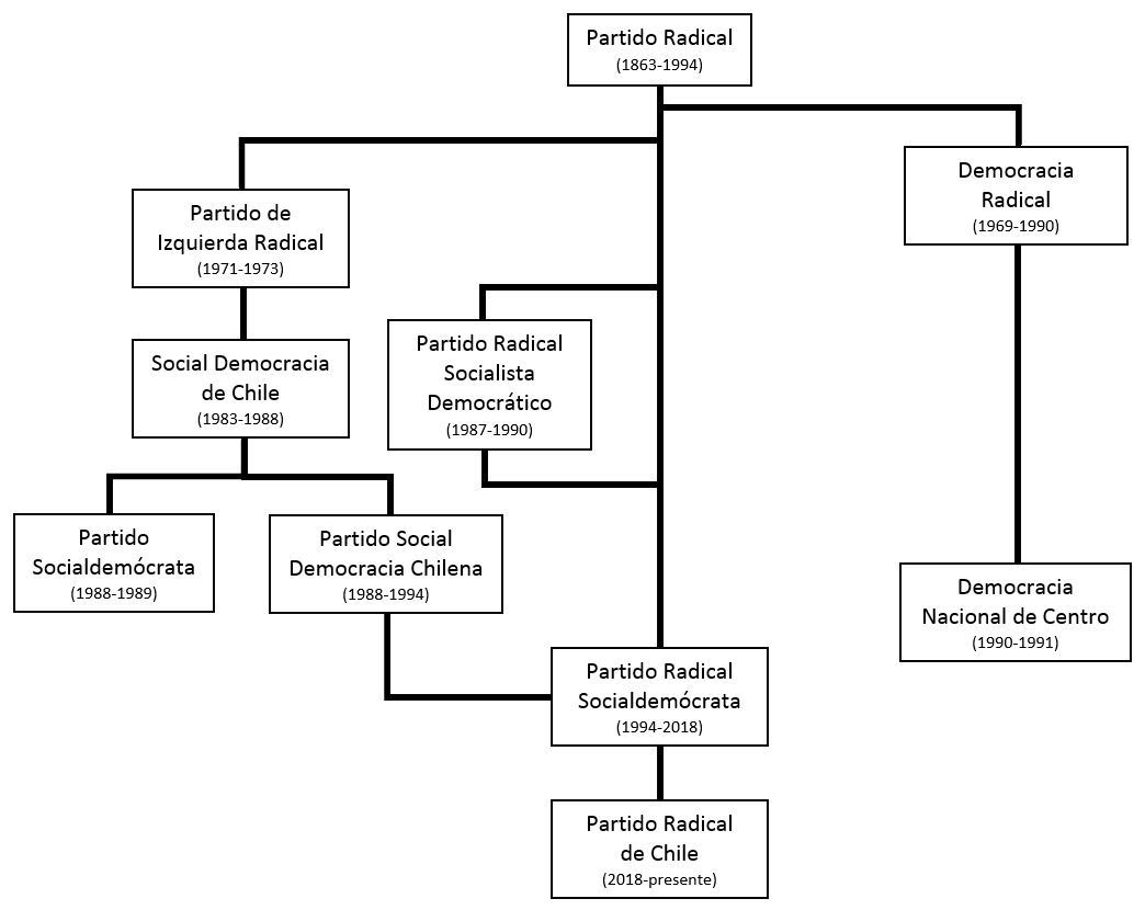 Esquema que muestra las distintas divisiones que sufrió el Partido Radical y sus derivados desde 1969 hasta 1994, fecha en que se fundó el Partido Radical Socialdemócrata.